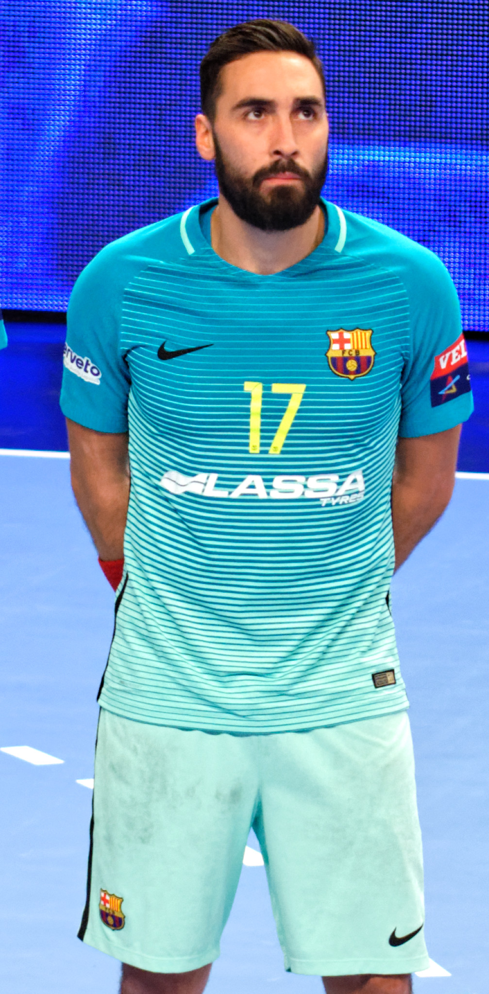 Rencontre de phase de groupe de la ligue des champions 2016-17 entre le PSG et le FC Barcelone. A Coubertin, le 12 novembre 2016.